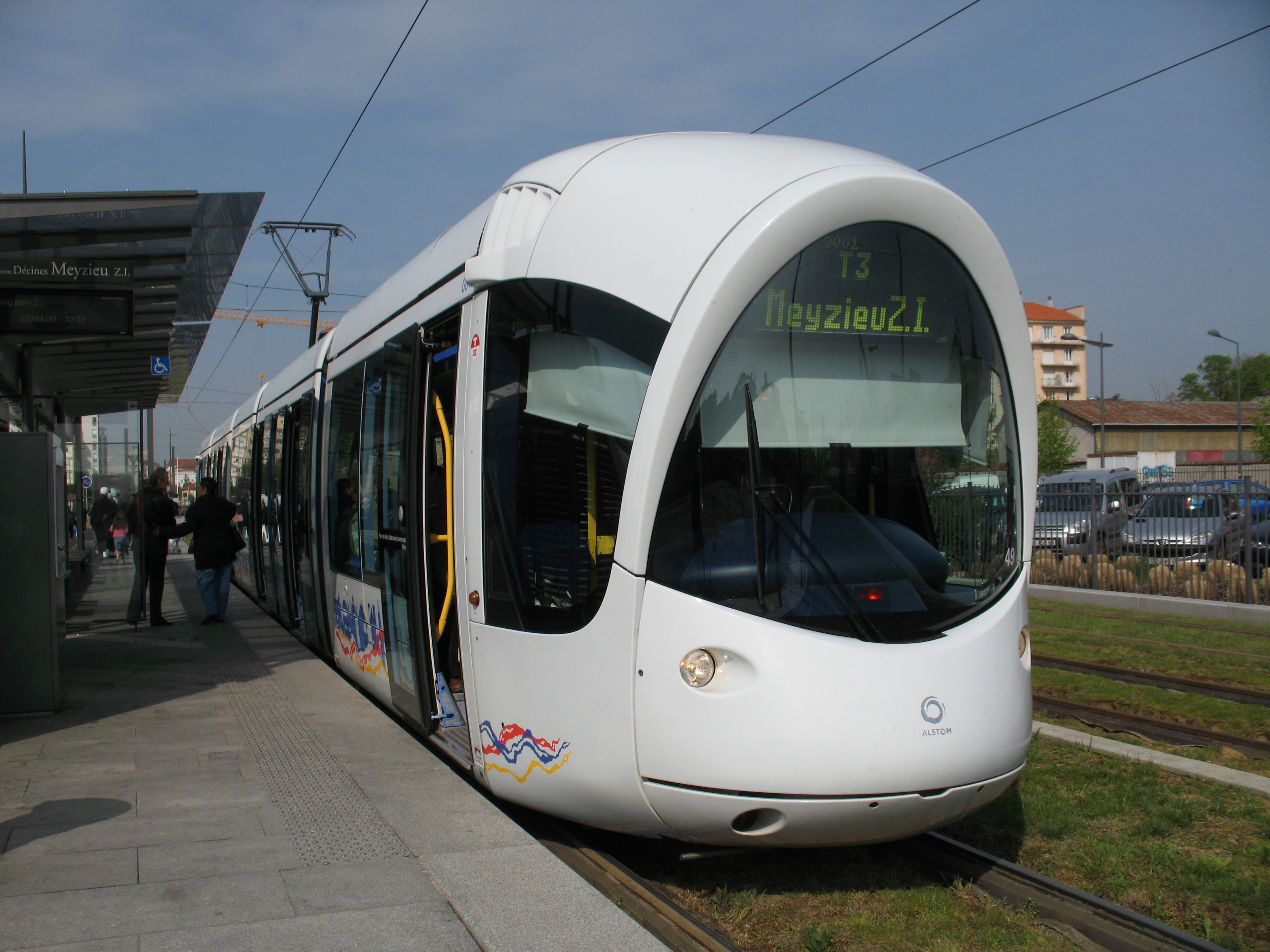 Rame Alstom Citadis 302 sur la ligne T3 à la Gare de Villeurbanne près de Lyon.